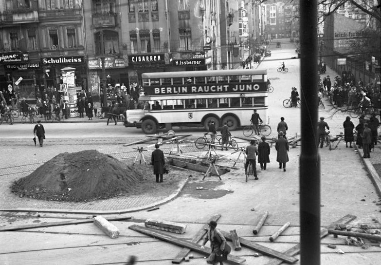 Grosse Streik-Unruhen in Berlin ! Der Verkehrsstreik der Berliner Strassenbahn, Untergrundbahn und Autobusse, welcher schon Menschenopfer gefordert hat, dauert an. Blick auf die Hauptstrasse in Schöneberg mit den von Streikenden errichteten Barrikaden.